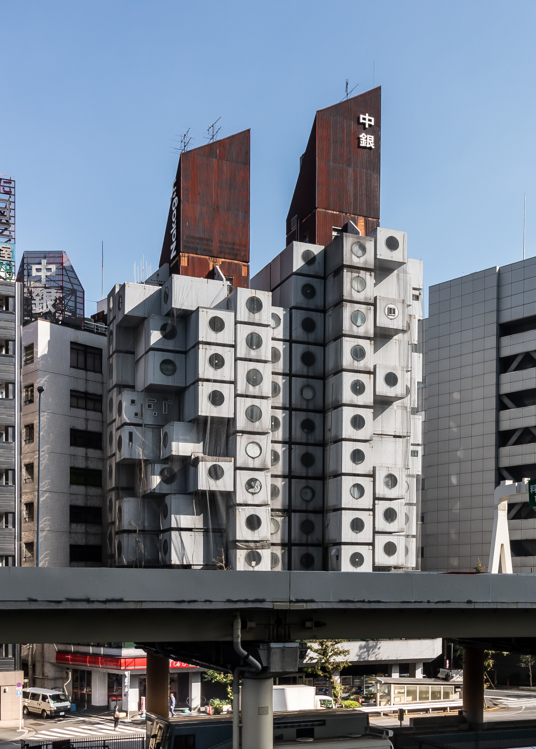 Nakagin Capsule Tower, at Shinbashi Tokyo Japan, design by Kisho Kurokawa in 1972.